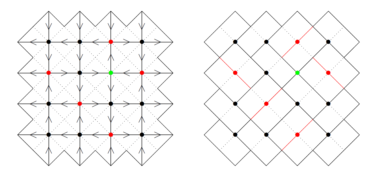 Équivalence entre le modèle à six vertex et le pavage par dominos d'un diamant aztèque. Les points indiqués en rouge correspondent au vertex de type 5, pour lequel deux choix de dominos sont possibles.